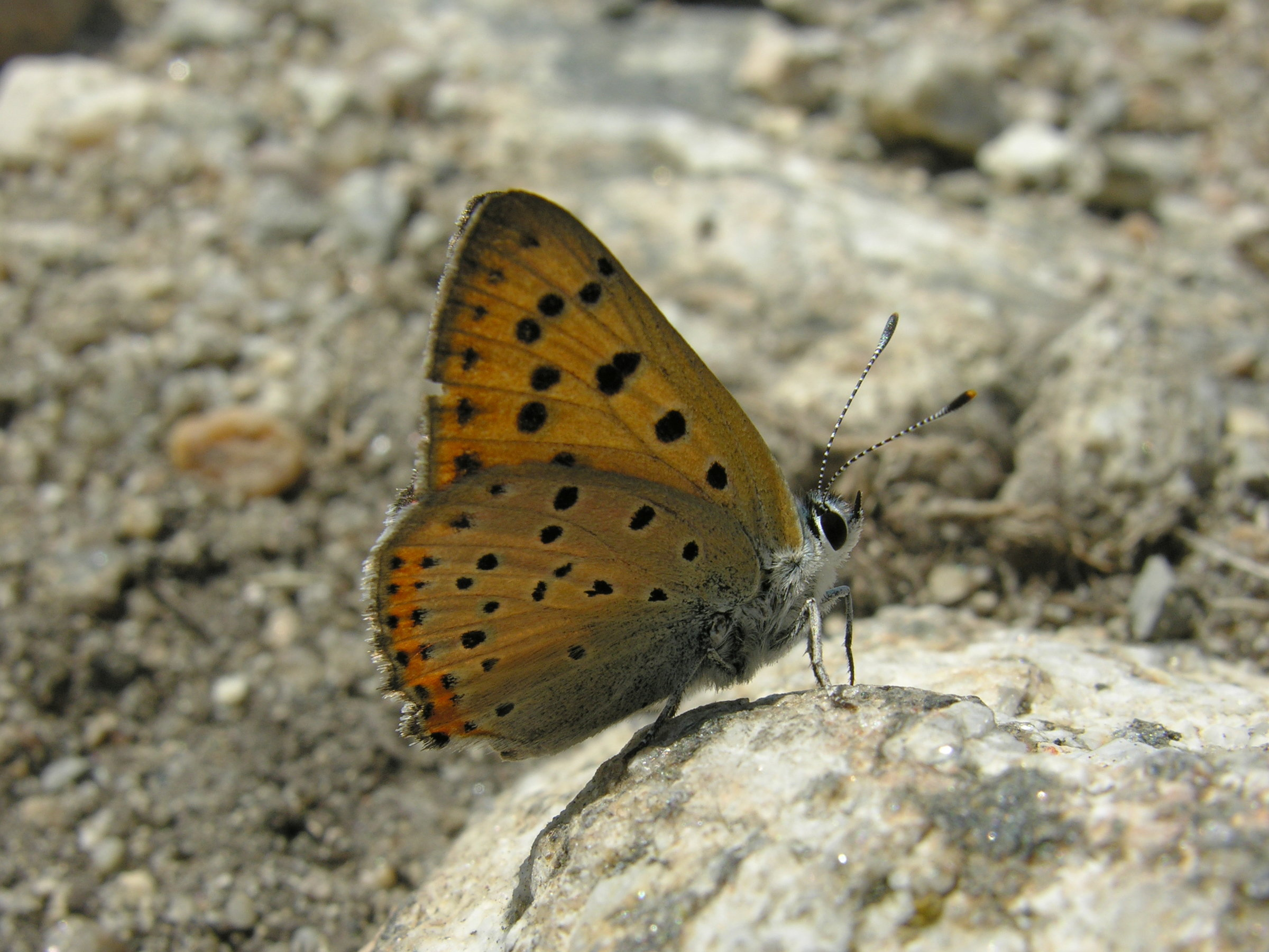 Lycaena alciphron (Lycaenidae). Guadarrama, Madrid, España.